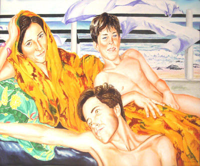 Título: Hijos de Africa. Autor Antonio García Cánovas. Acuarela sobre cartón